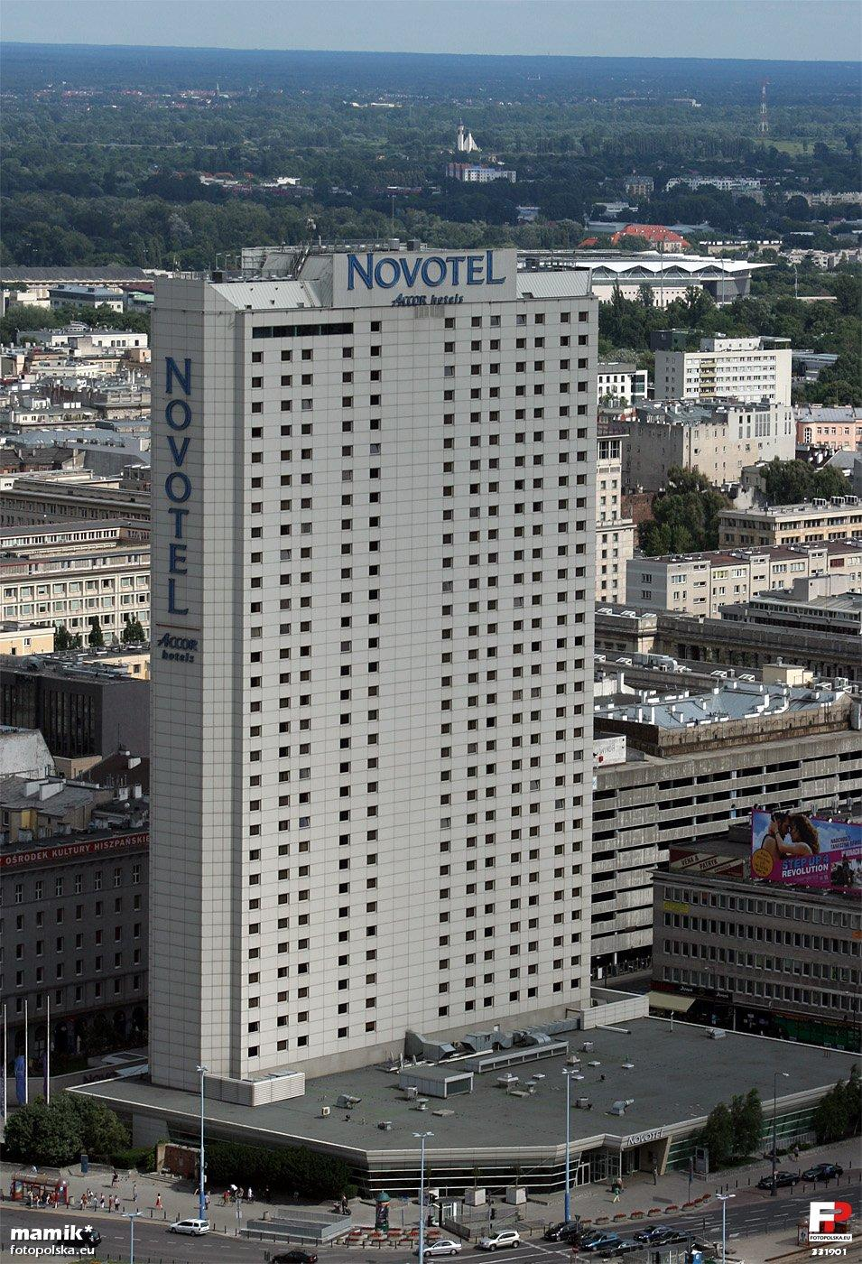 Novotel czyli dawny hotel Forum, w oczekiwaniu na kolejną reklamę